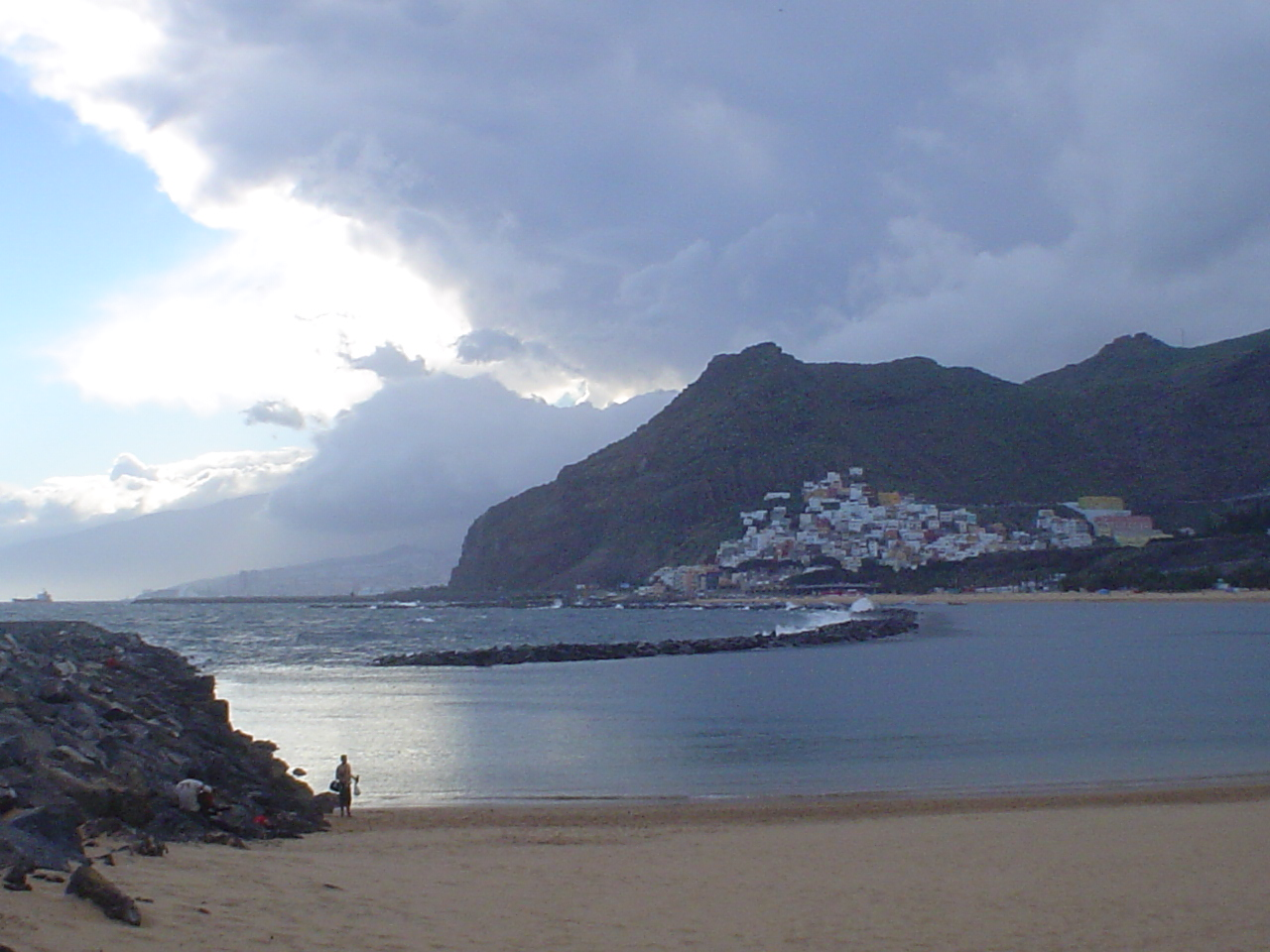 Vista de San Andrés desde la playa